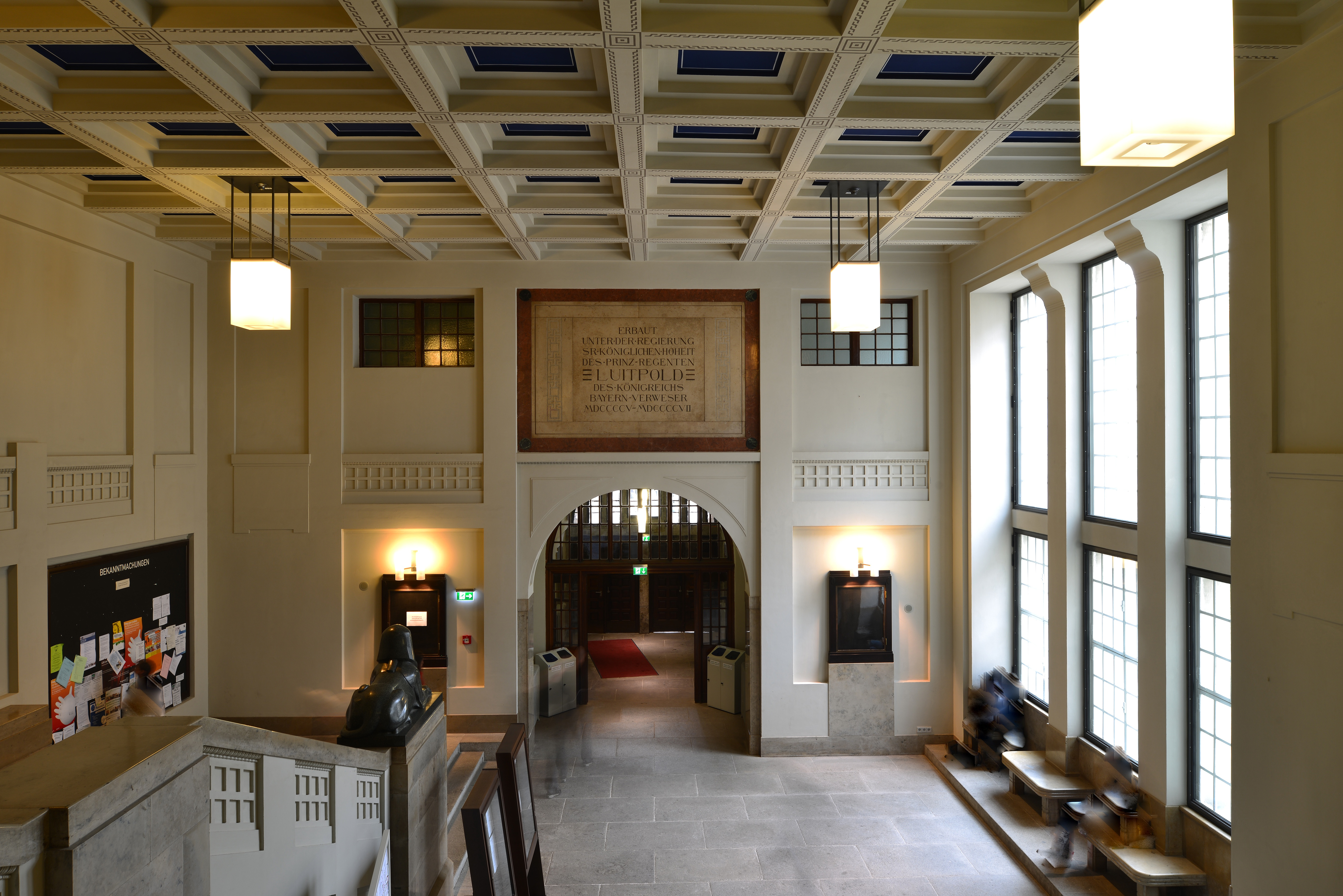 München, Anatomische Anstalt, Treppenhalle Haupteingang.